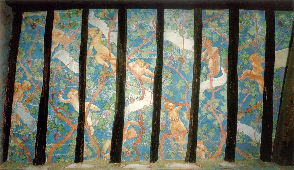 Lotto, affreschi di trescore, soffitto